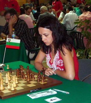 WGM Maria Velcheva Bulgaria, Villarrobledo 2008